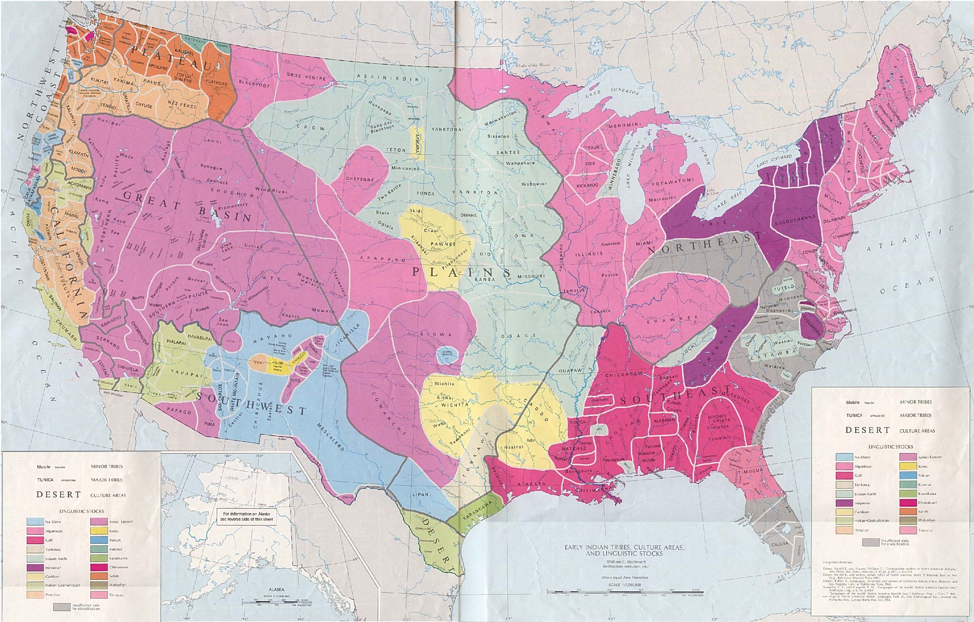 Combined image of: and